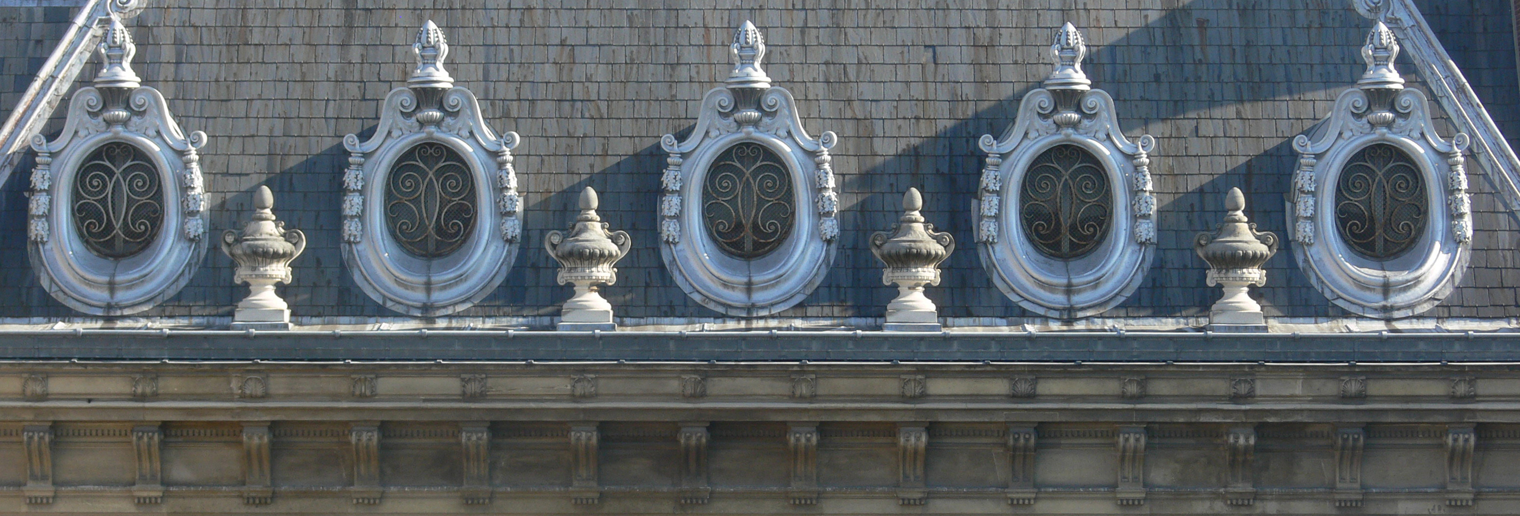 Bibliothèque nationale de France (Richelieu). Oeils de boeuf donnant sur la cour Vivienne